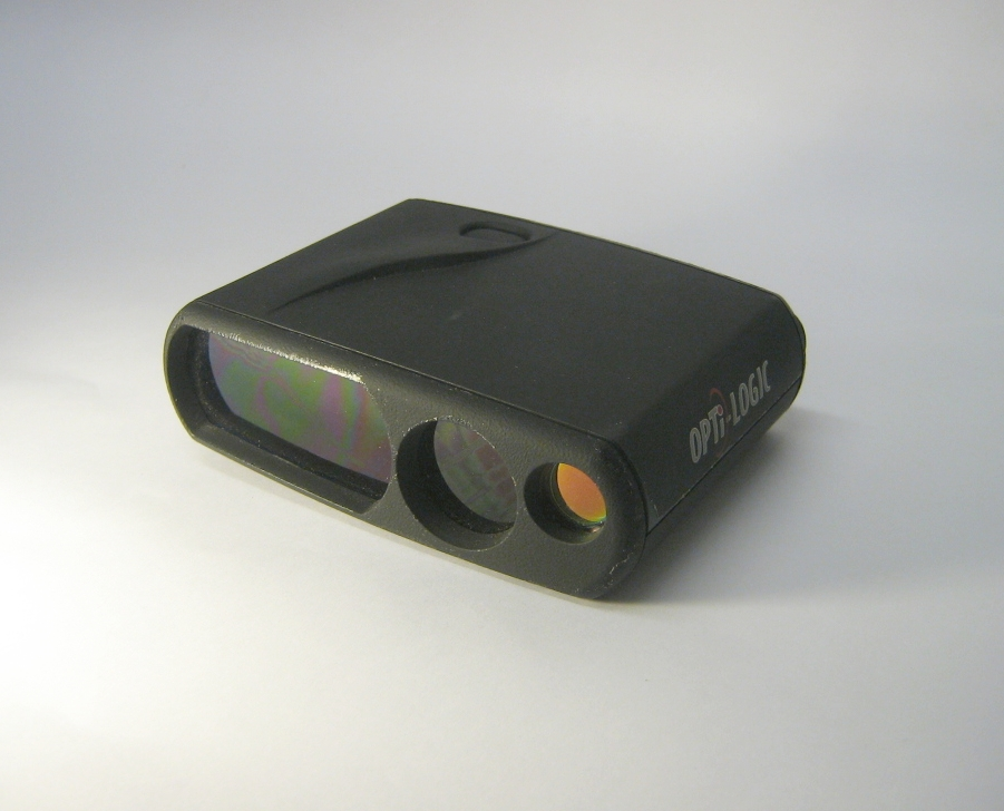 Opti-Logic Laser-Entfernungs und -Höhenmesser (Baumhöhenmesser).